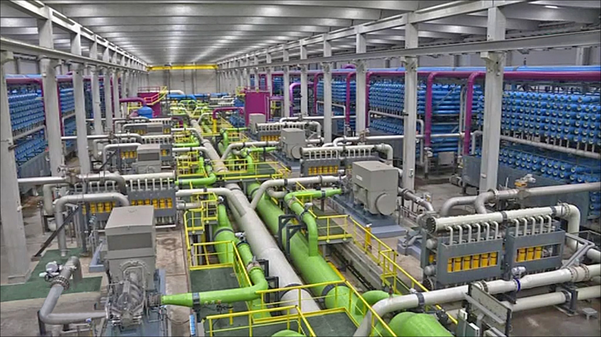 La plus grande usine d'Europe de dessalement de l'eau de mer est installée près de Barcelone, en Espagne. Capacité quotidienne est de 200 000 m3 d'eau potable.